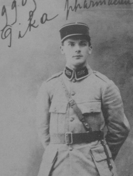 Heliodor Píka jako francouzský legionář v období 1. světové války.